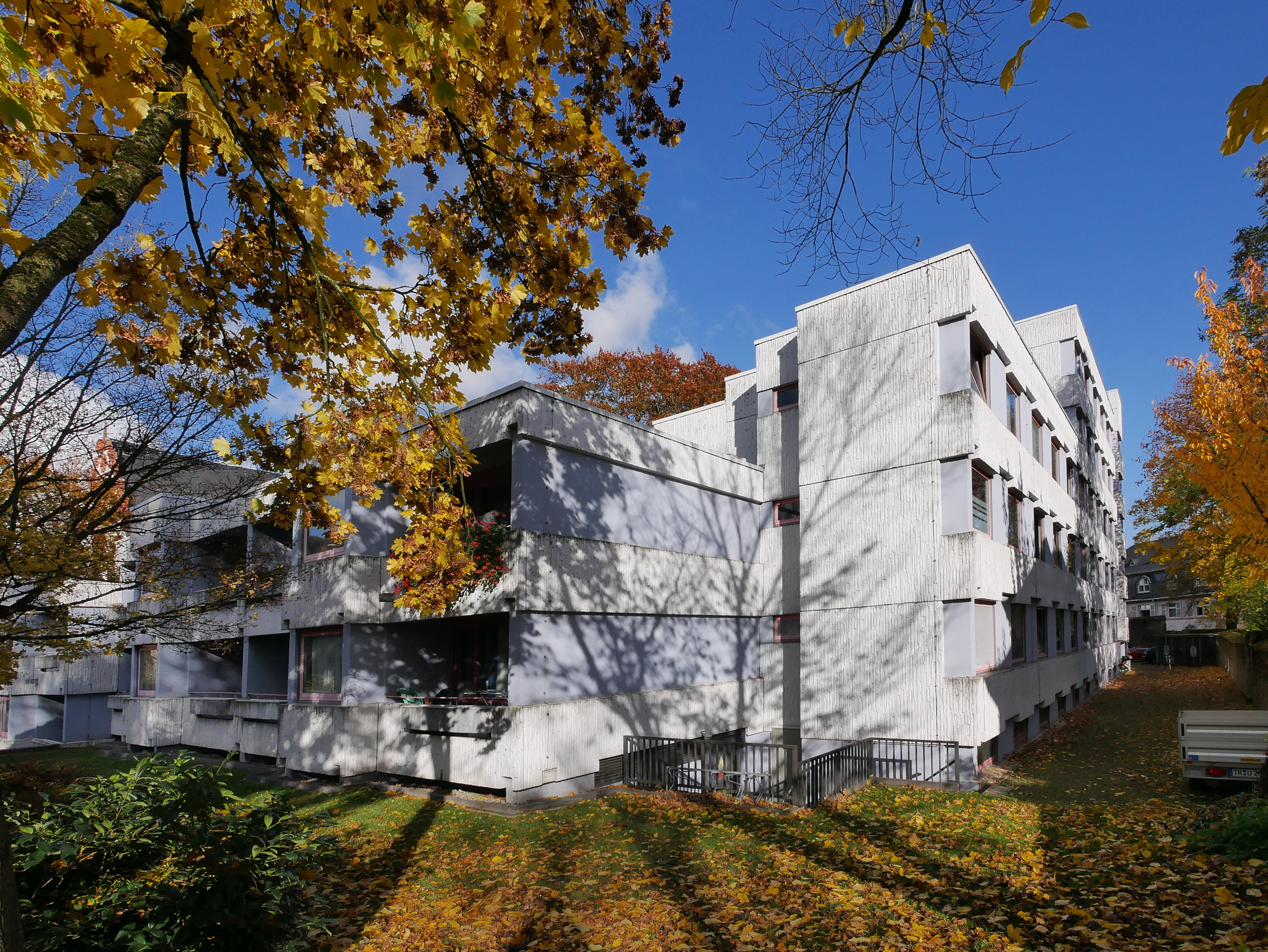 Studentenheim Martinskloster Trier, Neubau von 1971, wird vermutlich 2020 abgerissen, der linke Teil des Bildes ist der ungefähre Standort der ehemaligen Klosterkirche